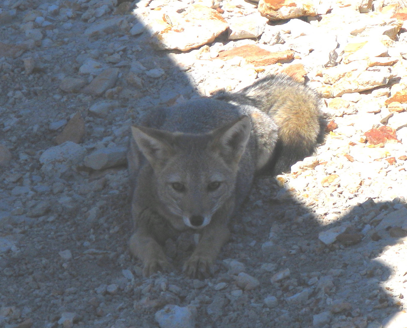 Zorro Gris - Patagonia Argentina